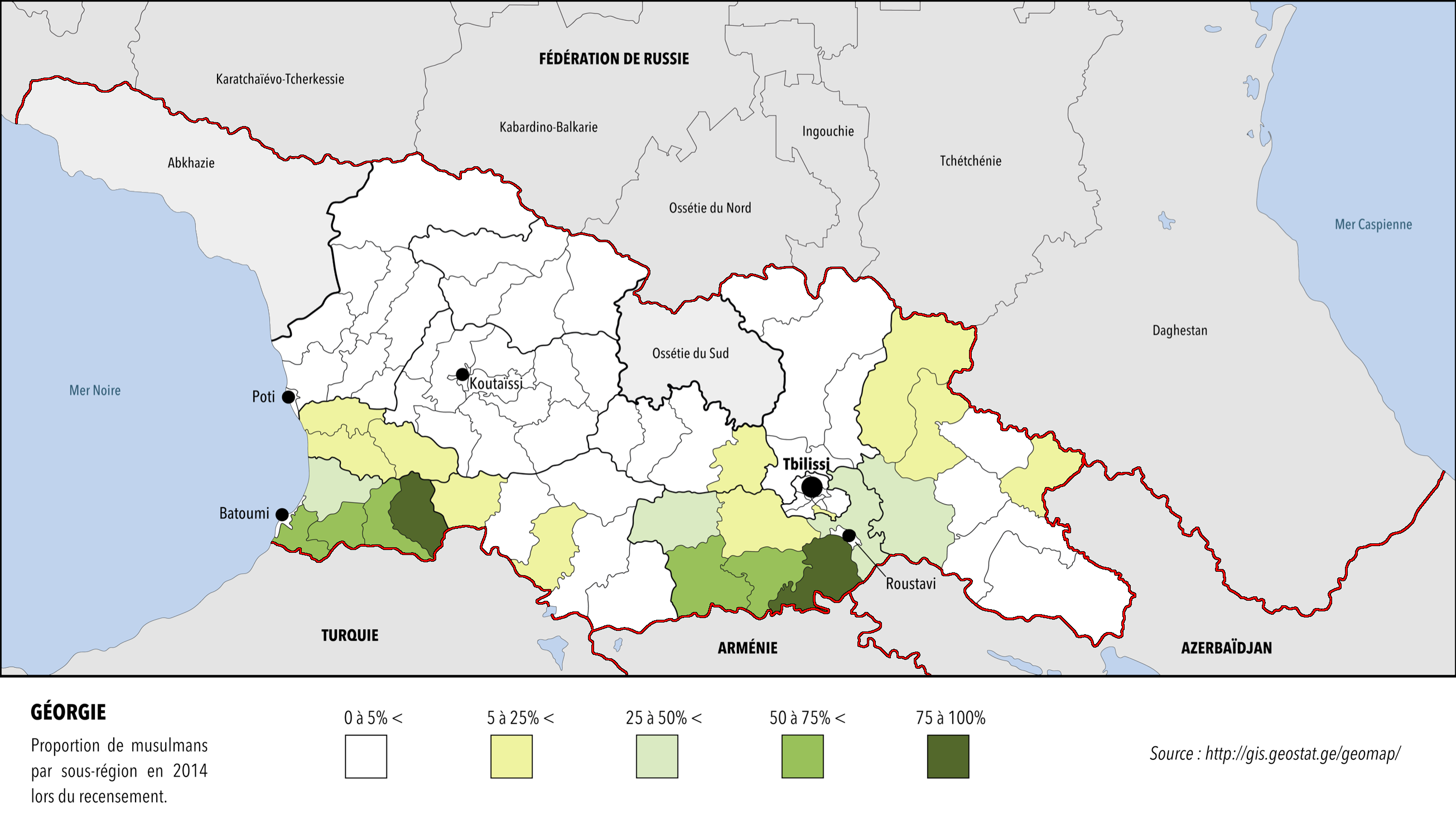 Proportion de Musulmans par sous région lors du recensement de 2014.